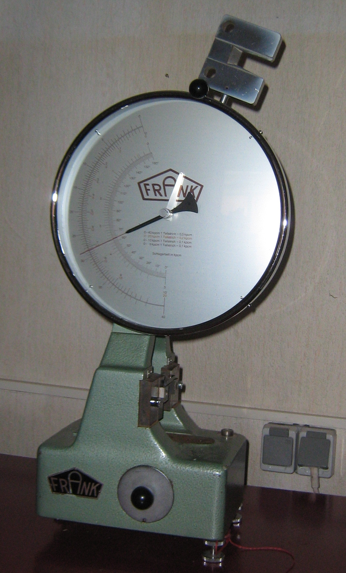 Schlagpendel für Kerbschlagbiegeprüfungen